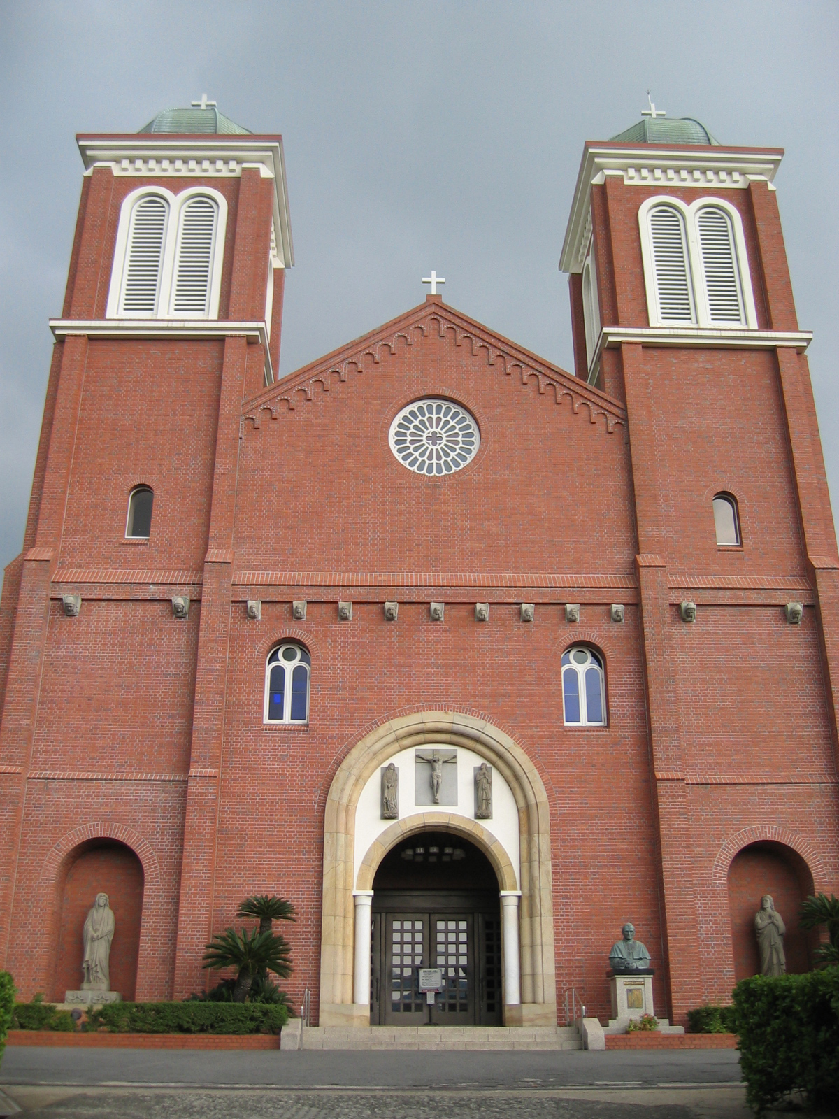 Собор Уракамі в Нагасакі